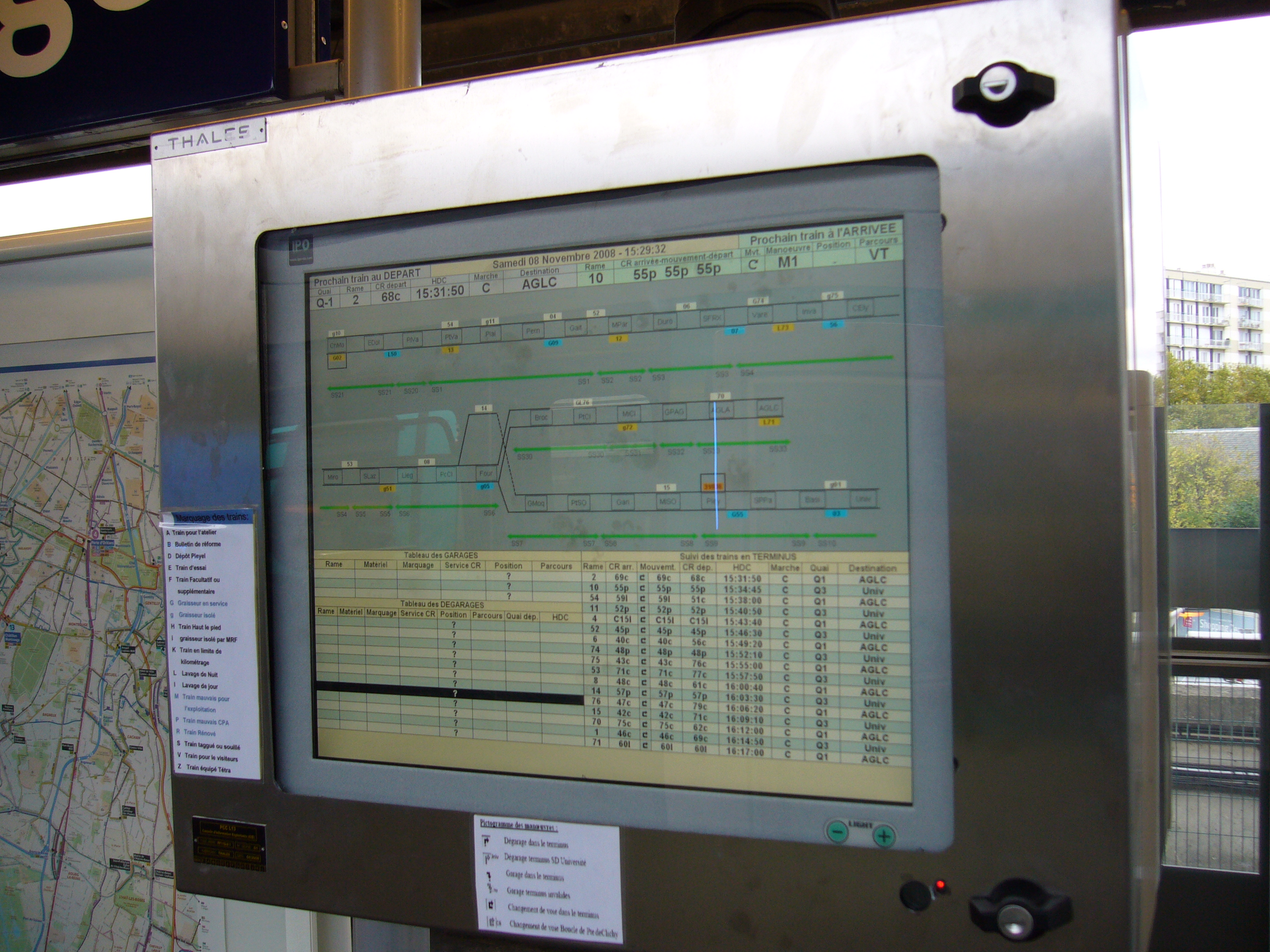 Logiciel de gestion des trains accessible aux conducteurs pour connaître les garages et dégarages au terminus Châtillon - Montrouge sur la ligne 13 du métro de Paris.